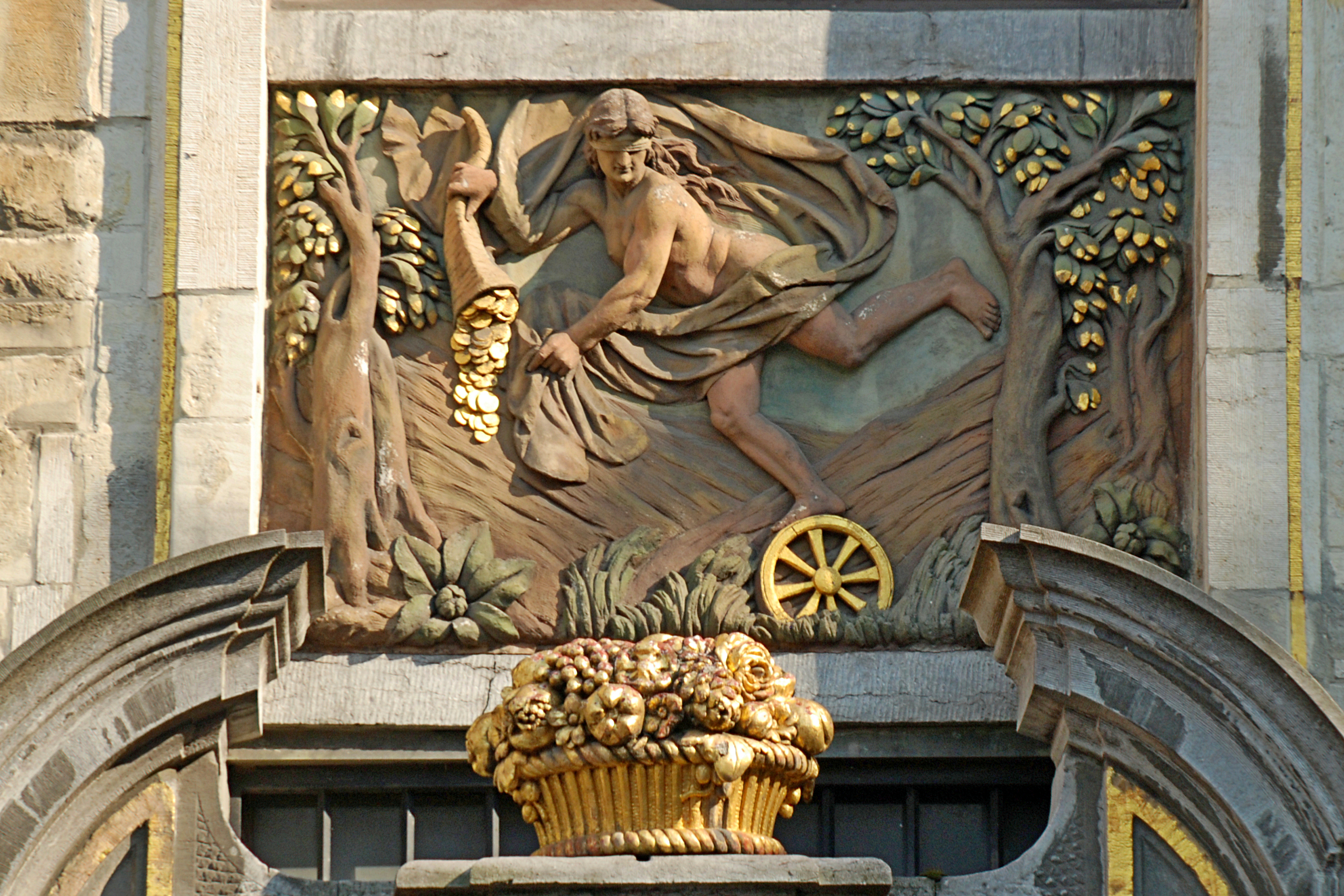 Belgique - Bruxelles - Maison de la Fortune